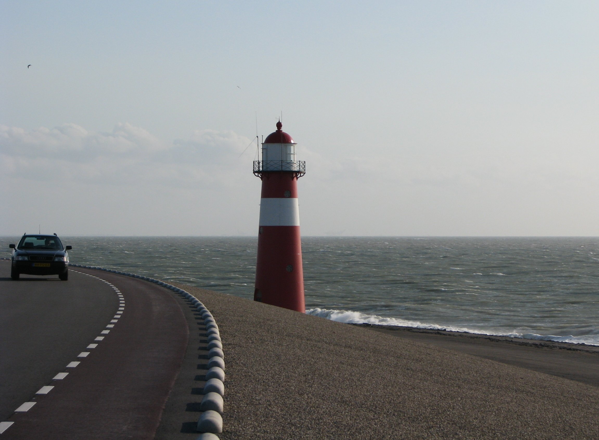 Westkapelle Laag Walcheren Zeeland - vuurtoren ijzeren torentje op de zeedijk 2008 photo Wolfgang Pehlemann IMG_0133